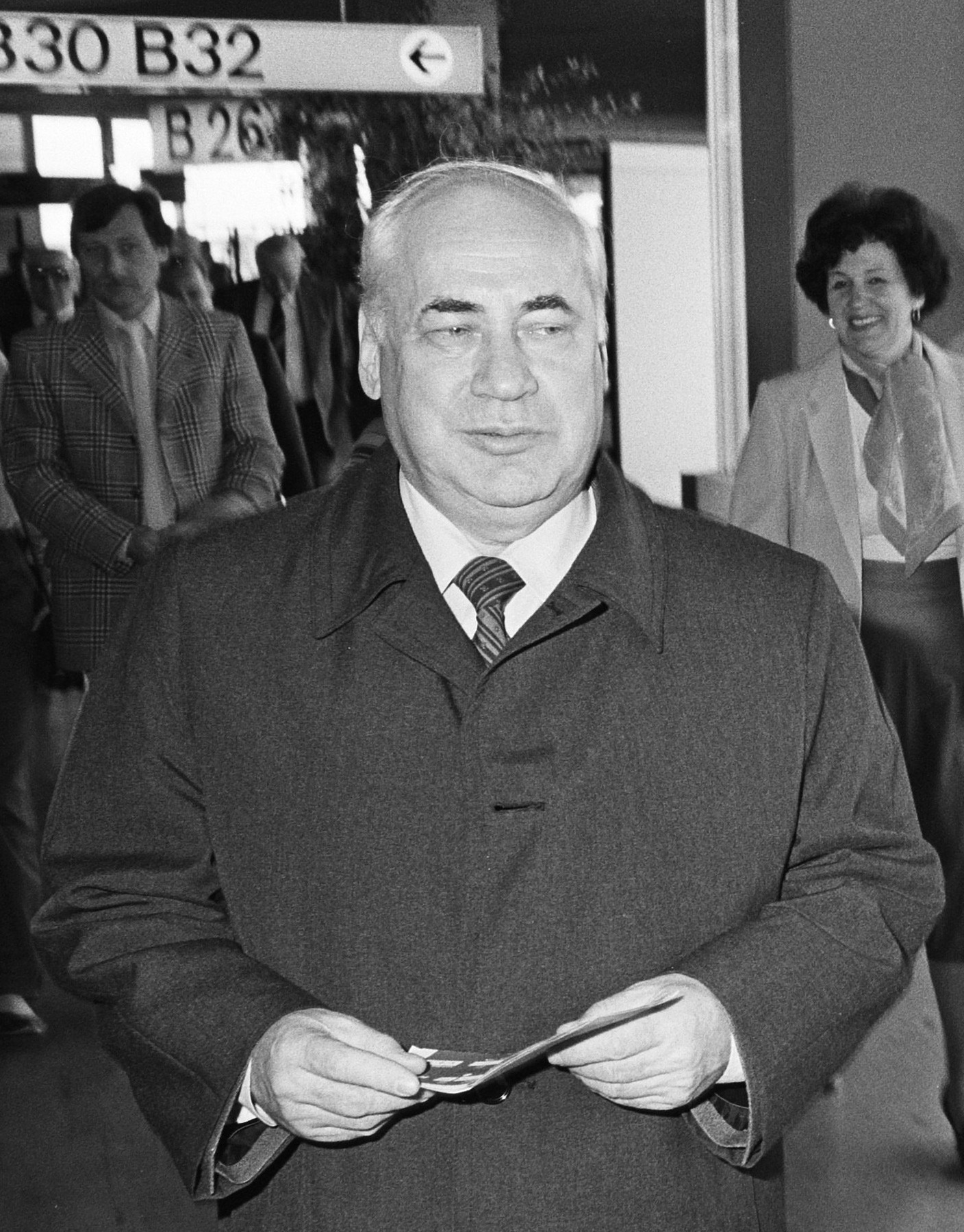 Russische ambassadeur Tolstikov terug naar Rusland; nr. 1 Tolstikov neemt afscheid X. Timofeev